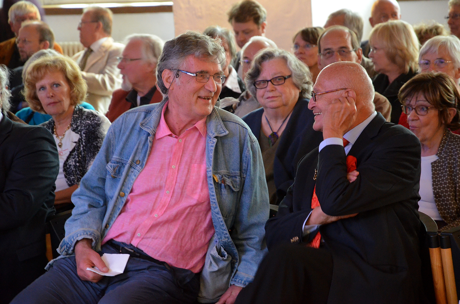 Momentaufnahme der Vernissage der Ausstellung Niemandsland, der Retrospektive des Künstlers János Nádasdy auf Schloss Landestrost vom 21. Juni bis zum 3. August 2014 ...